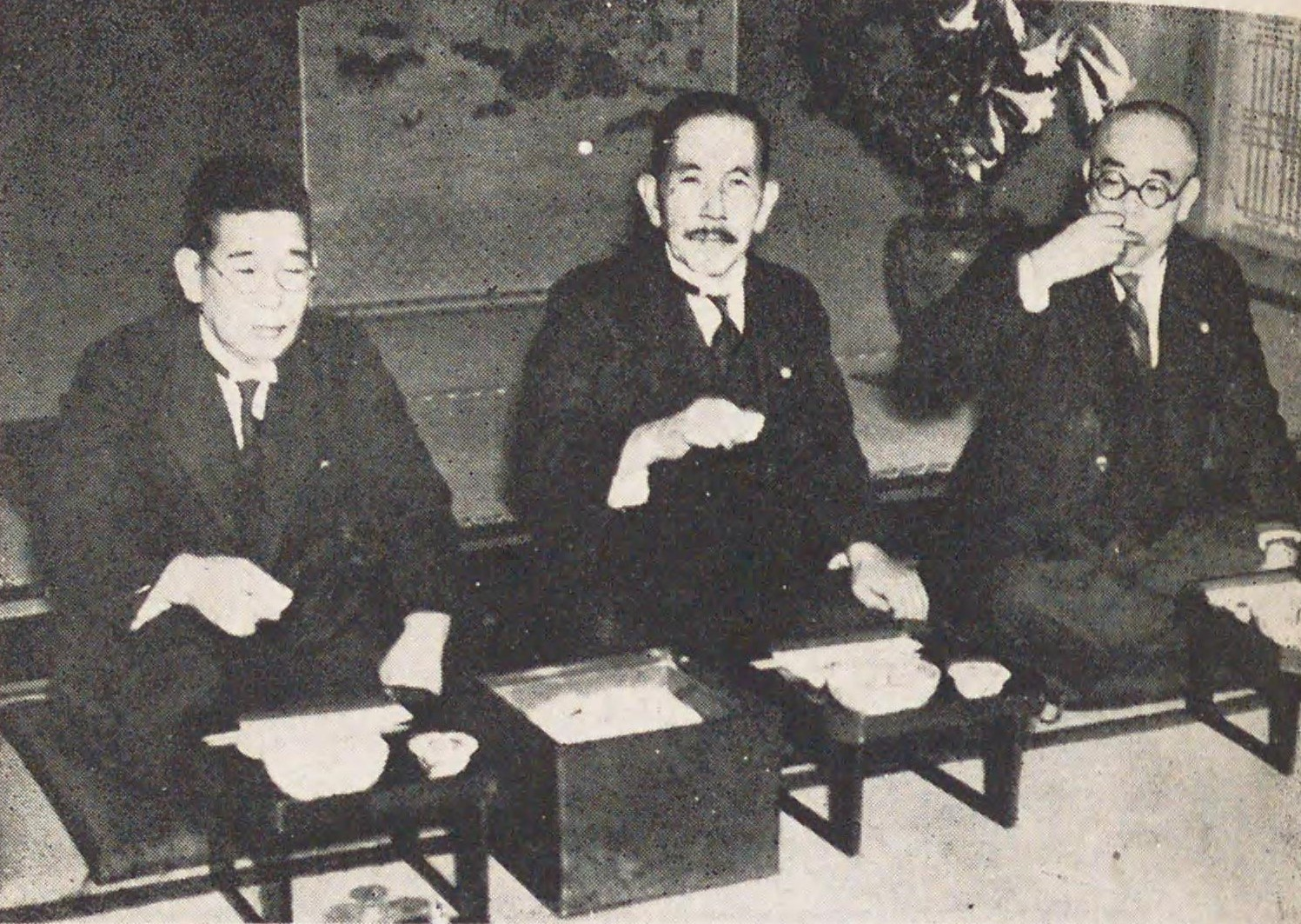 左から、山崎達之輔、望月圭介、内田信也。昭和会(1935年-1937年)での忘年会の様子。